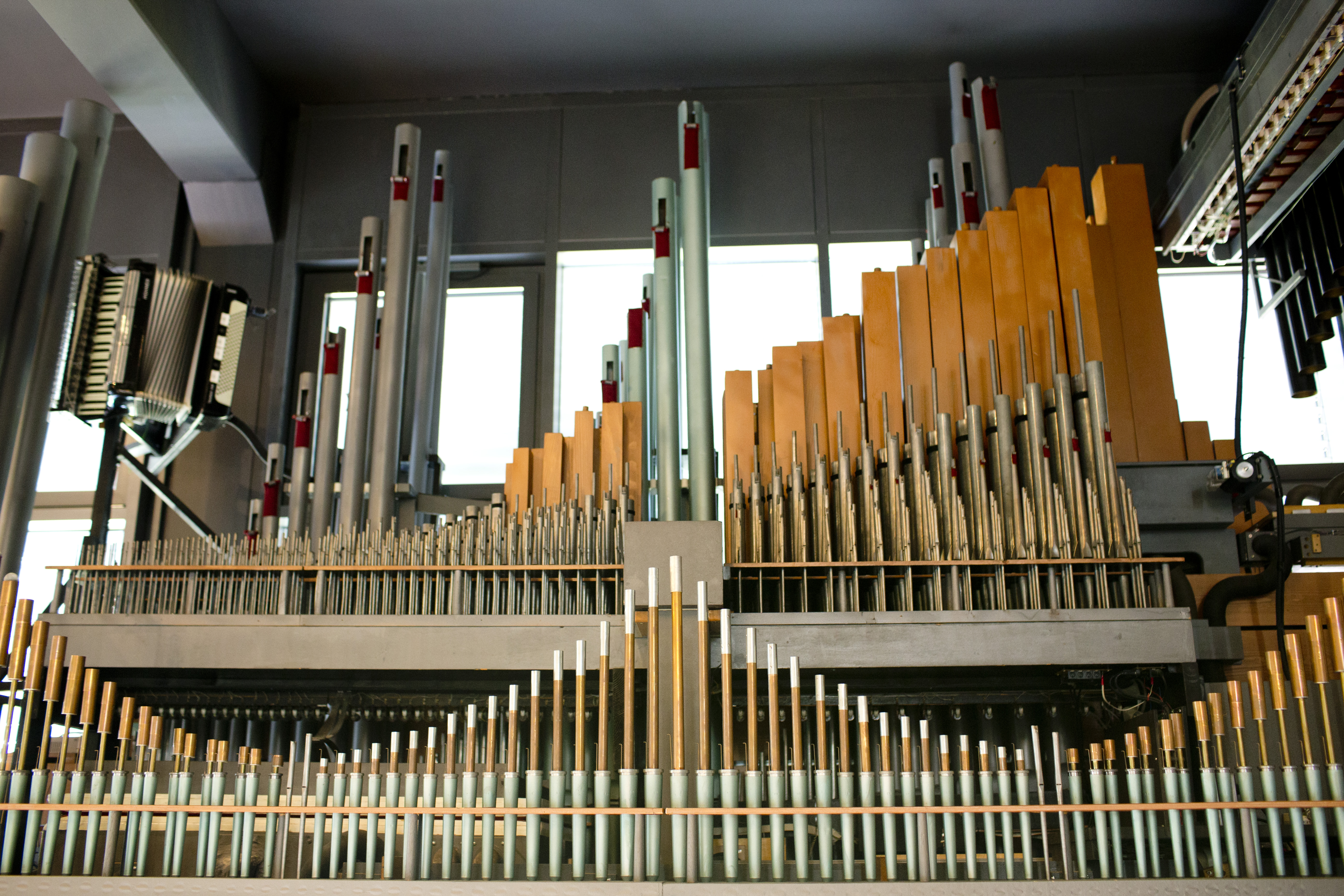 Nebenwerk der Harder-Völkmann Orgel im Stockwerk Gröbenzell